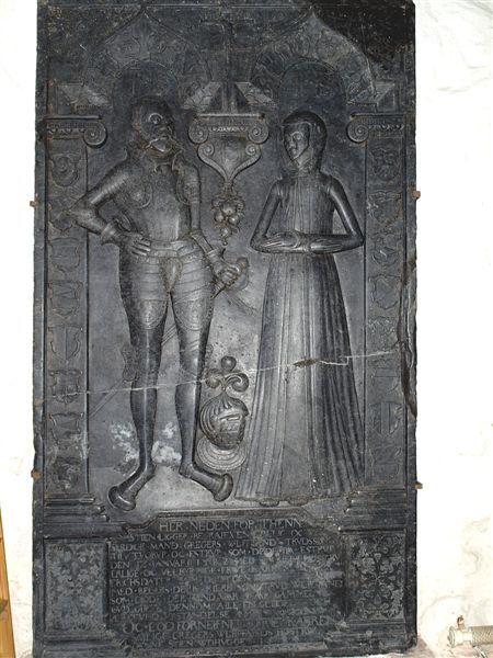 Favsing Kirke i Danmark. Gravsten over Gregers Truidsen Ulfstand og Karen Banner